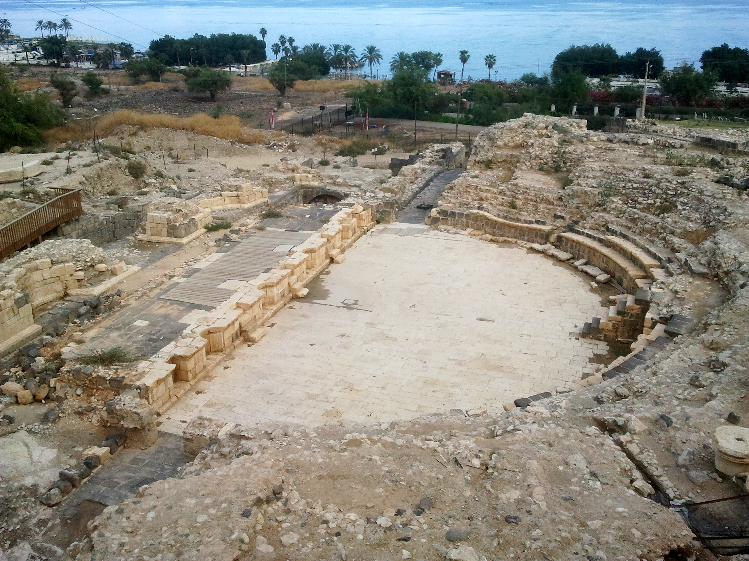 התיאטרון הרומי בטבריה הוא אתר ארכאולוגי השוכן בחלקה הדרומי של טבריה באזור הפארק הארכאולוגי של העיר לרגלי הר ברניקי